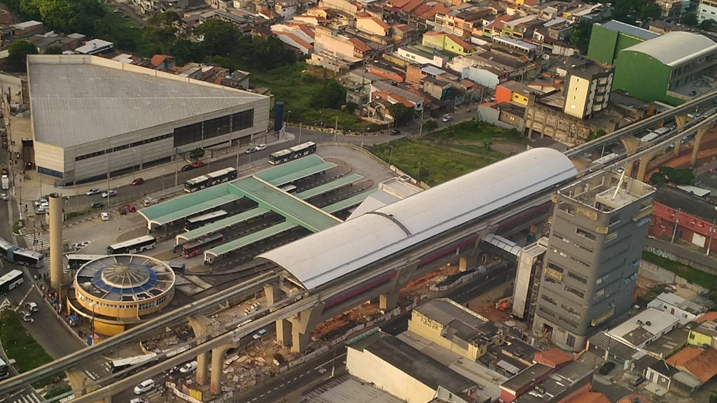 Estação Sapopemba da Linha 15 Prata do Metrô de São Paulo em obras. Abril de 2018.